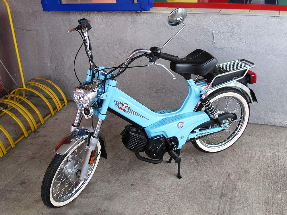 Tomos Classic XL 25 (Laller, Gleisdorf)